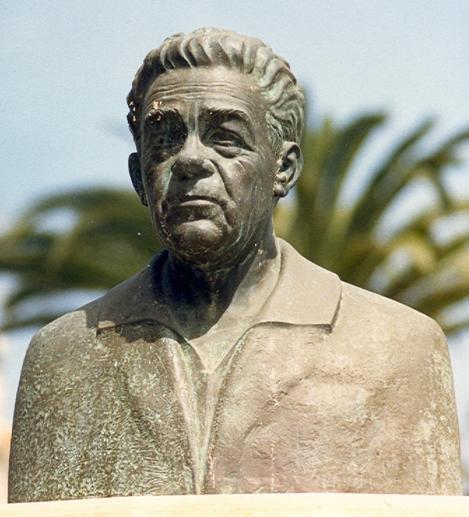 Monumento a Pedro Gomez